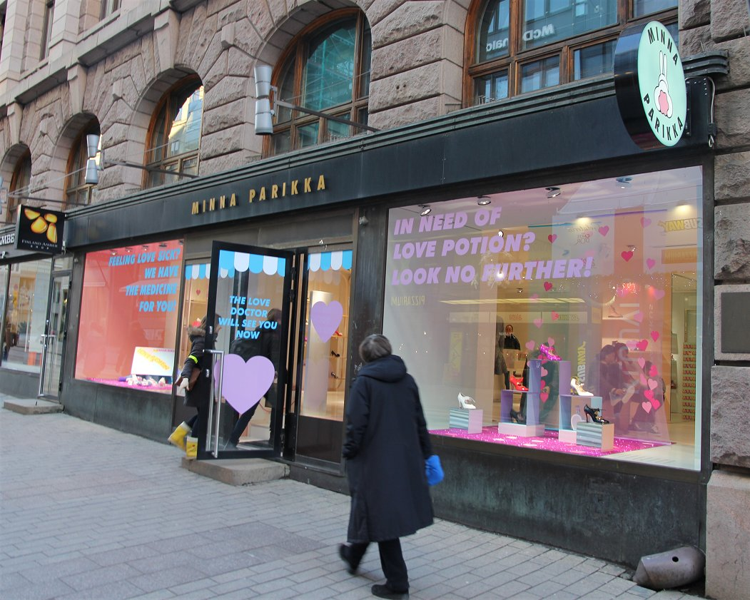 Suomalaisen kenkäsuunnittelija Minna Parikan kenkämyymälä Helsingin Aleksanterinkadulla.